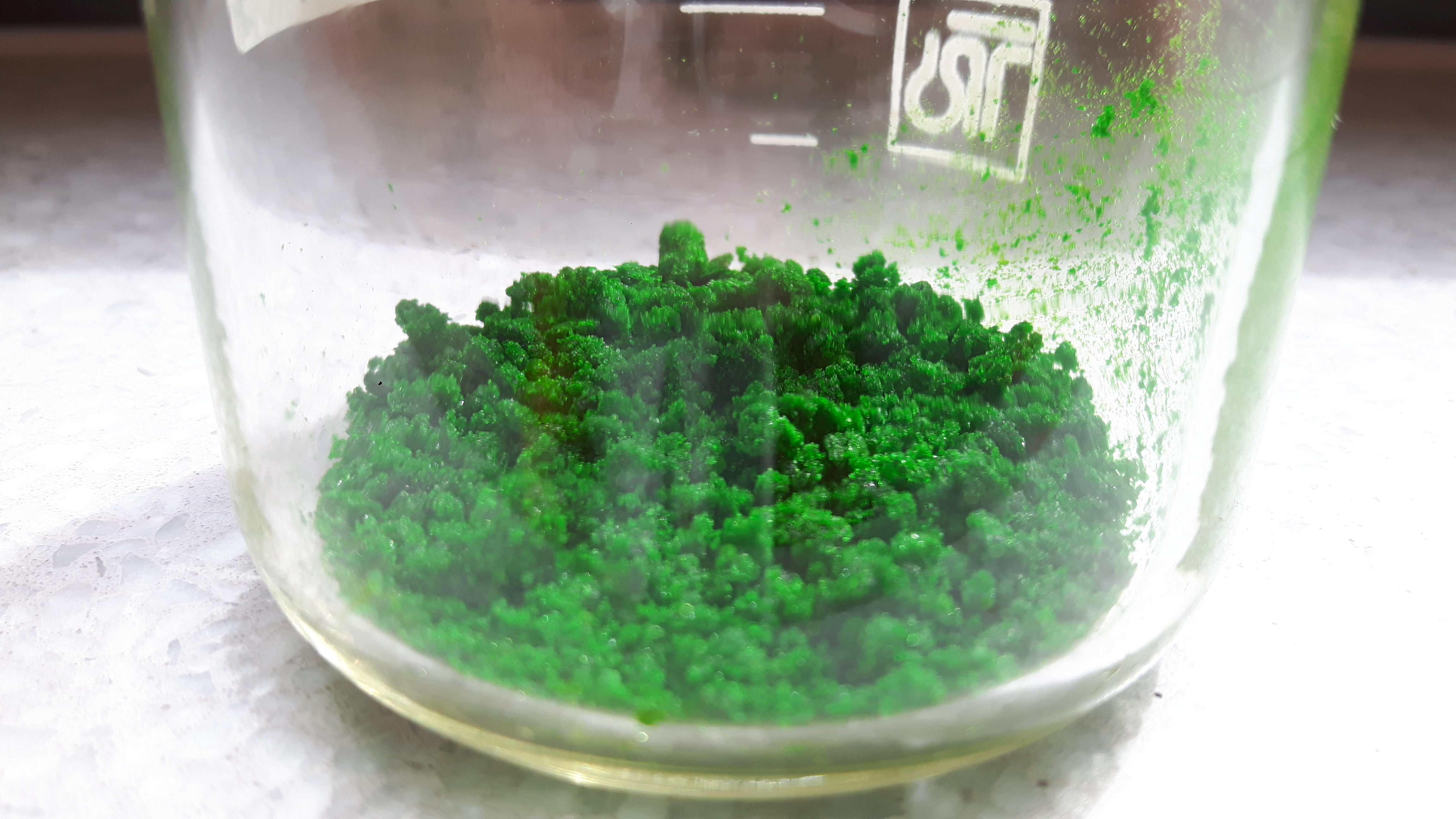 Bis(diethylammonium)tetrachloridocuprat(II): Produkt der Synthese im präparativen Praktikum. Die Niedrigtemperaturvariante erscheint grün.